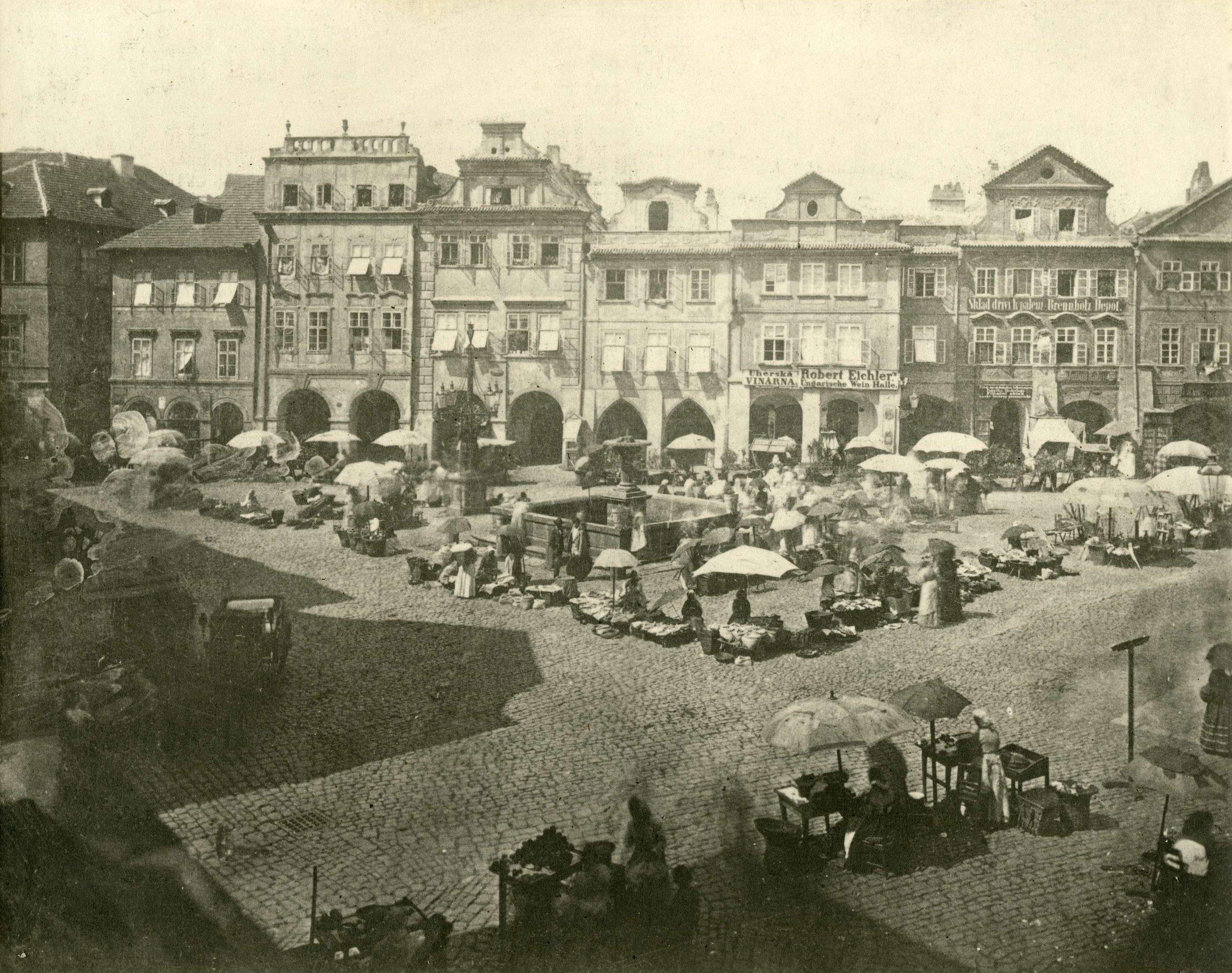 Západní strana Uhelného trhu mezi ulicemi Skořepka (vlevo) a Michalská (vpravo) na Pražském Starém Městě.